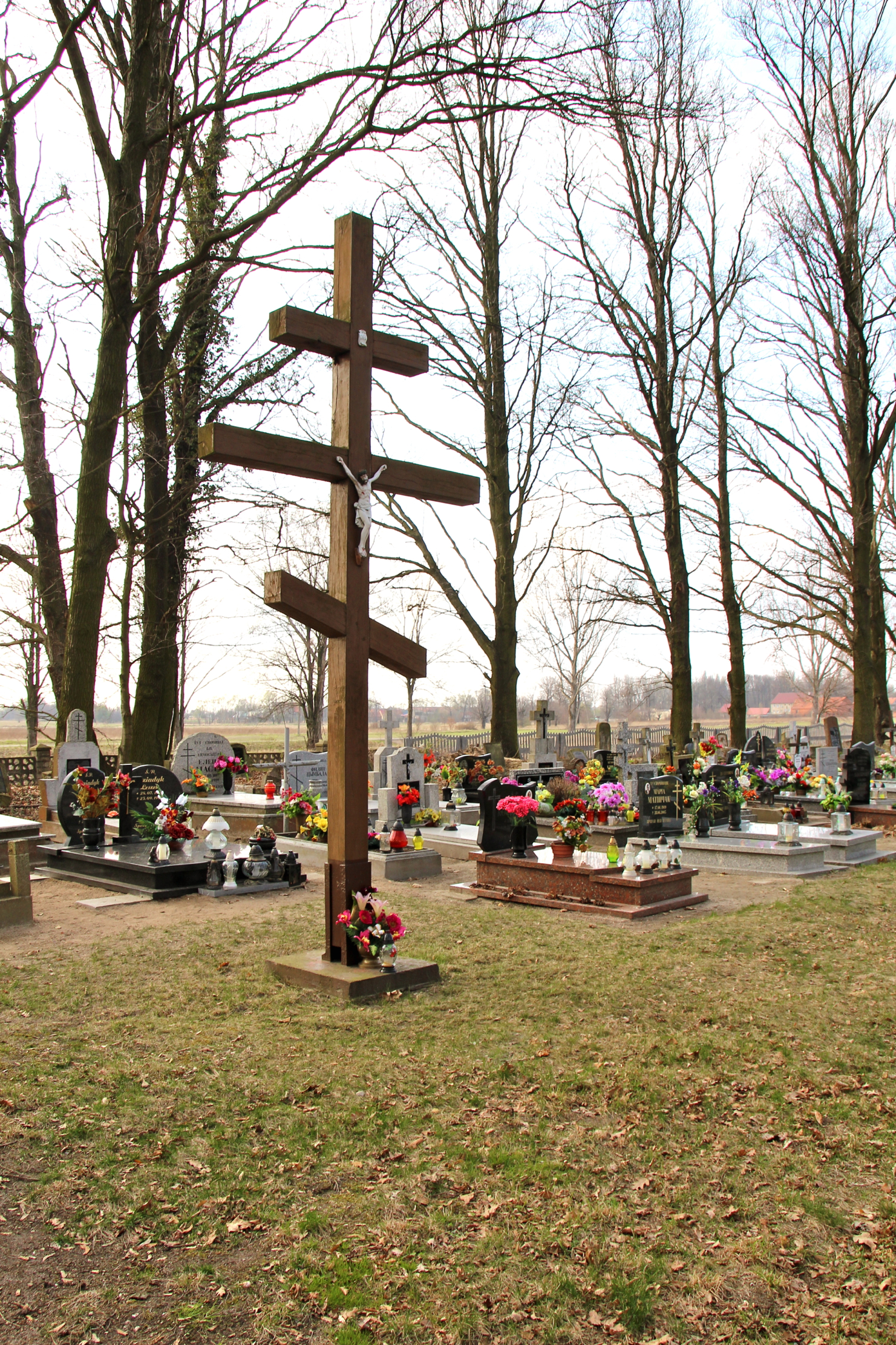 Buczyna – województwie dolnośląskim, w powiecie polkowickim, w gminie Radwanice.